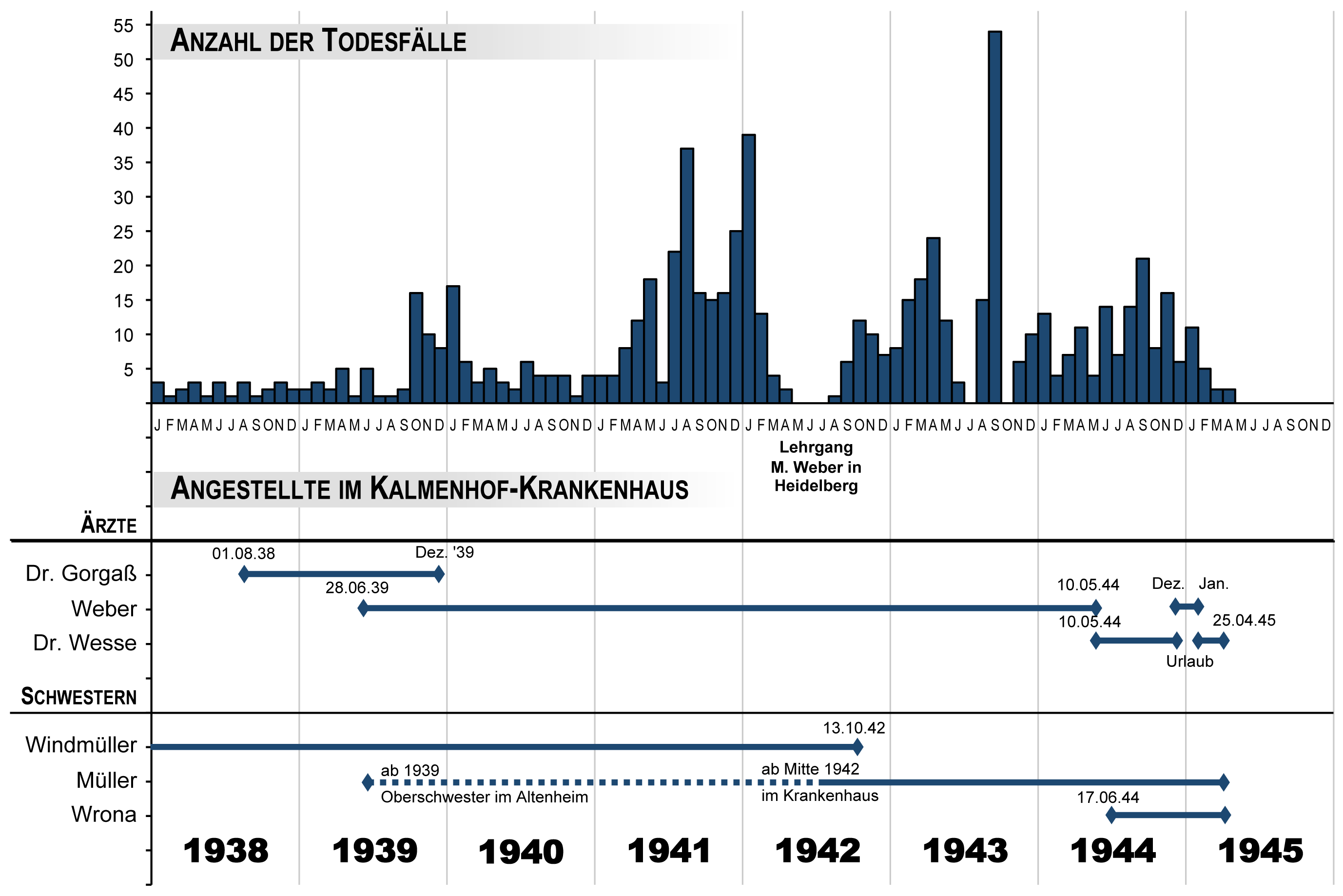 Überblick über die Todesfälle im Kalmenhof 1938-1945.